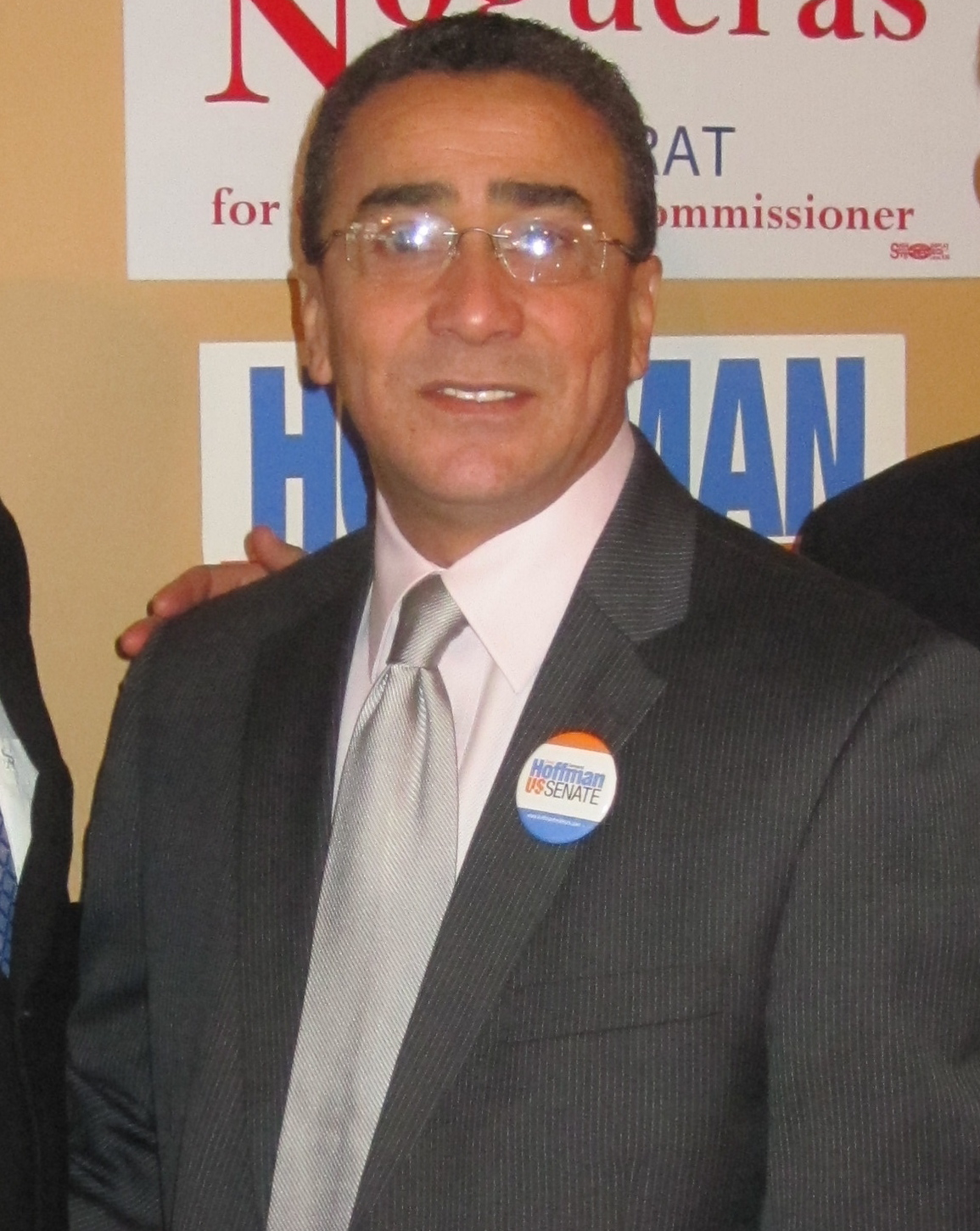 HoffmanDelgadoNogueras